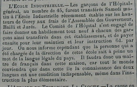 L'ouverture de l'école industrielle de Jersey, actuellement appelée Haut de la Garenne, à Saint Martin en 1867 selon la Nouvelle Chronique de Jersey du 26 juin 1867